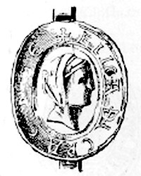 Pfalzgräfin Eilica von Bayern